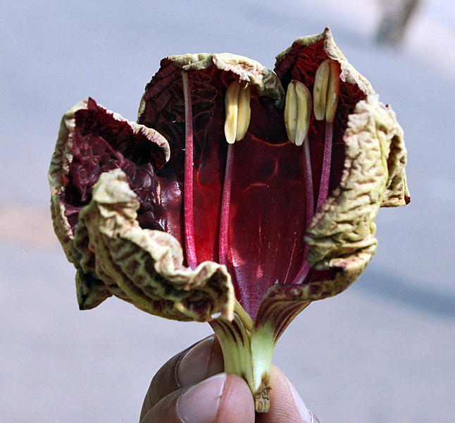 Sausage Tree Kigelia africana in Kolkata, West Bengal, India.